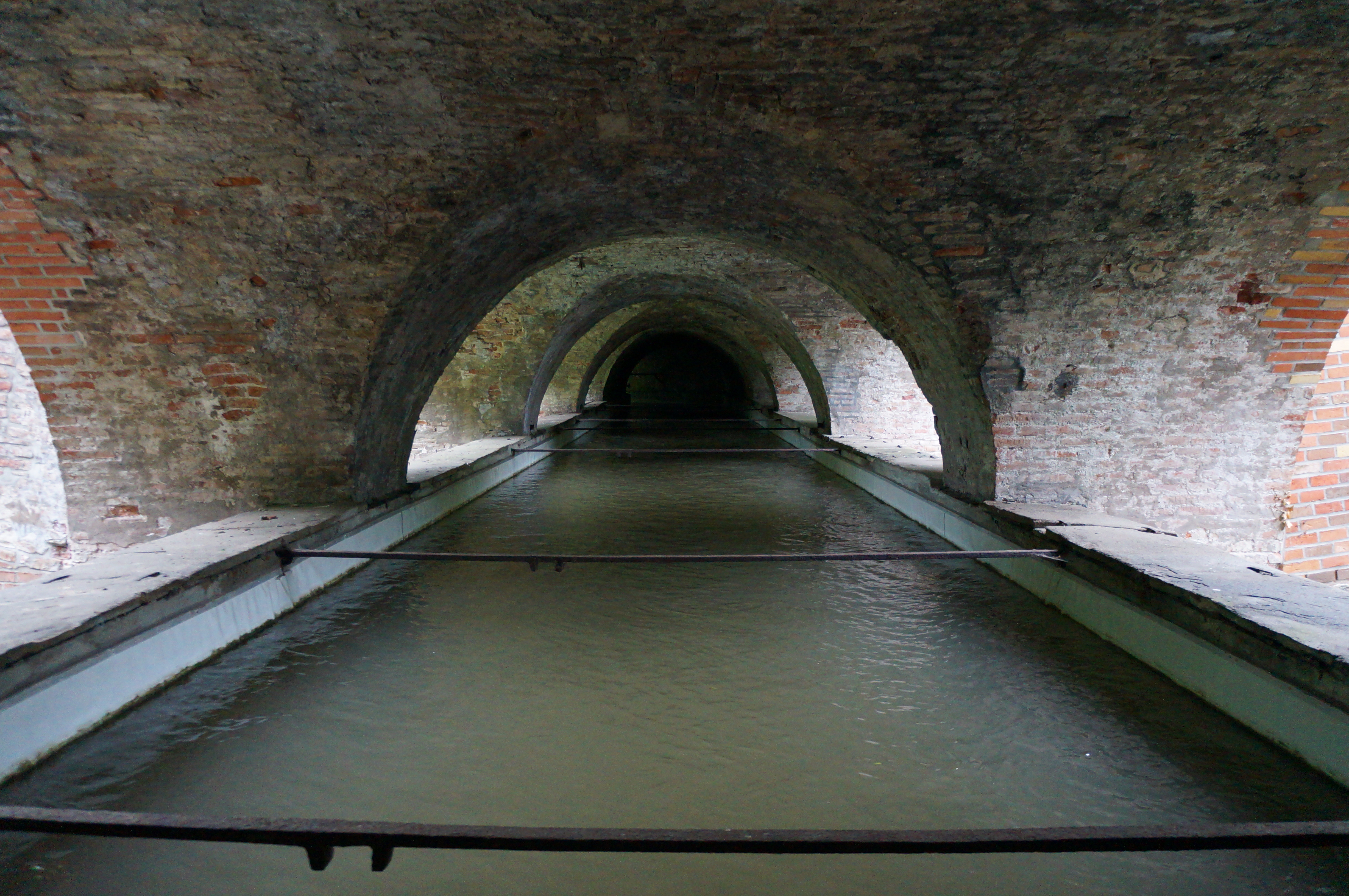 Aquädukt in den Wassertürmen beim Roten Tor in Augsburg.